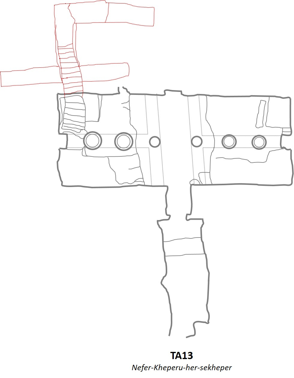 Planimetria schematica della Tomba dei Nobili TA13 di Amarna